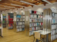 Template:Sala di lettura interna